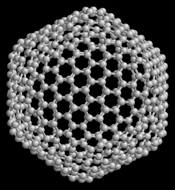 Fullerene C540